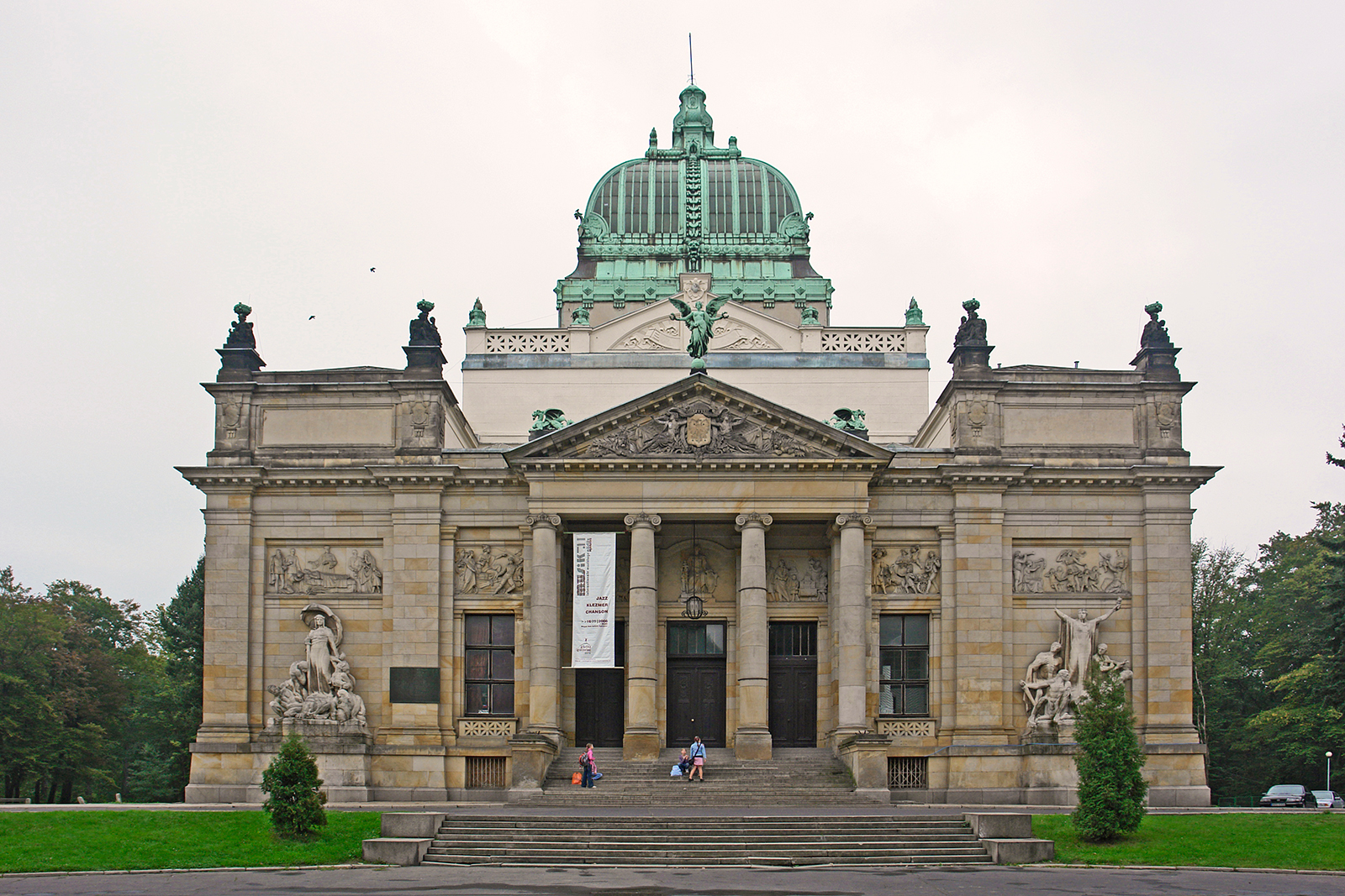 Dom Kulturny